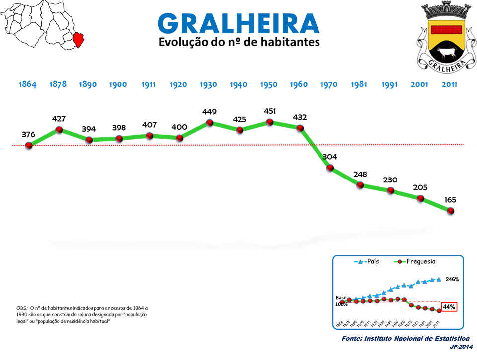 Evolução da População 1864 / 2011